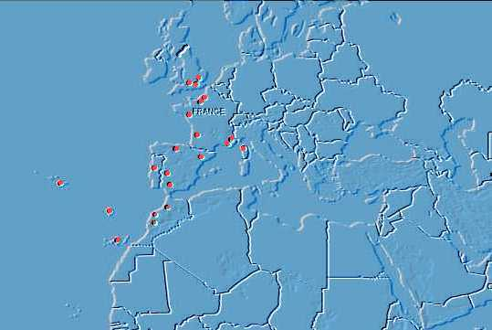 carte de répartition de Steatoda nobilis